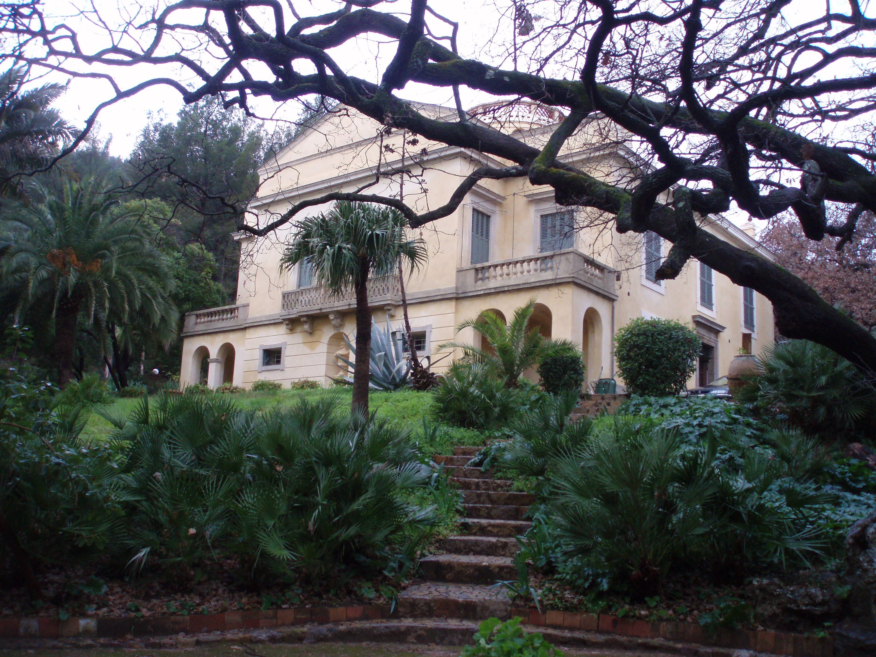 Le Plantier de Costebelle, Hyères, France